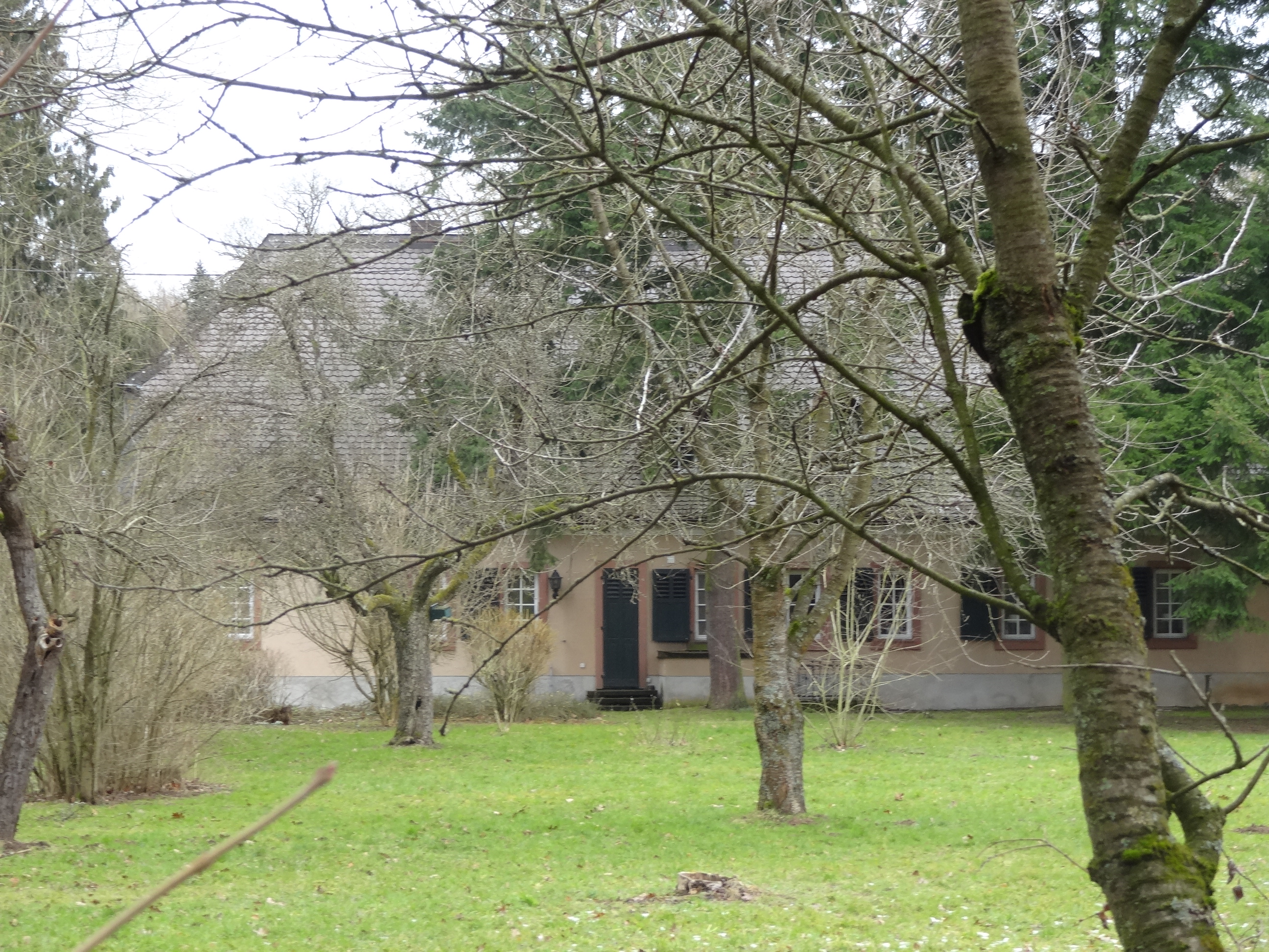 Ehemaliges Forsthaus Glaubzahl (Harb)